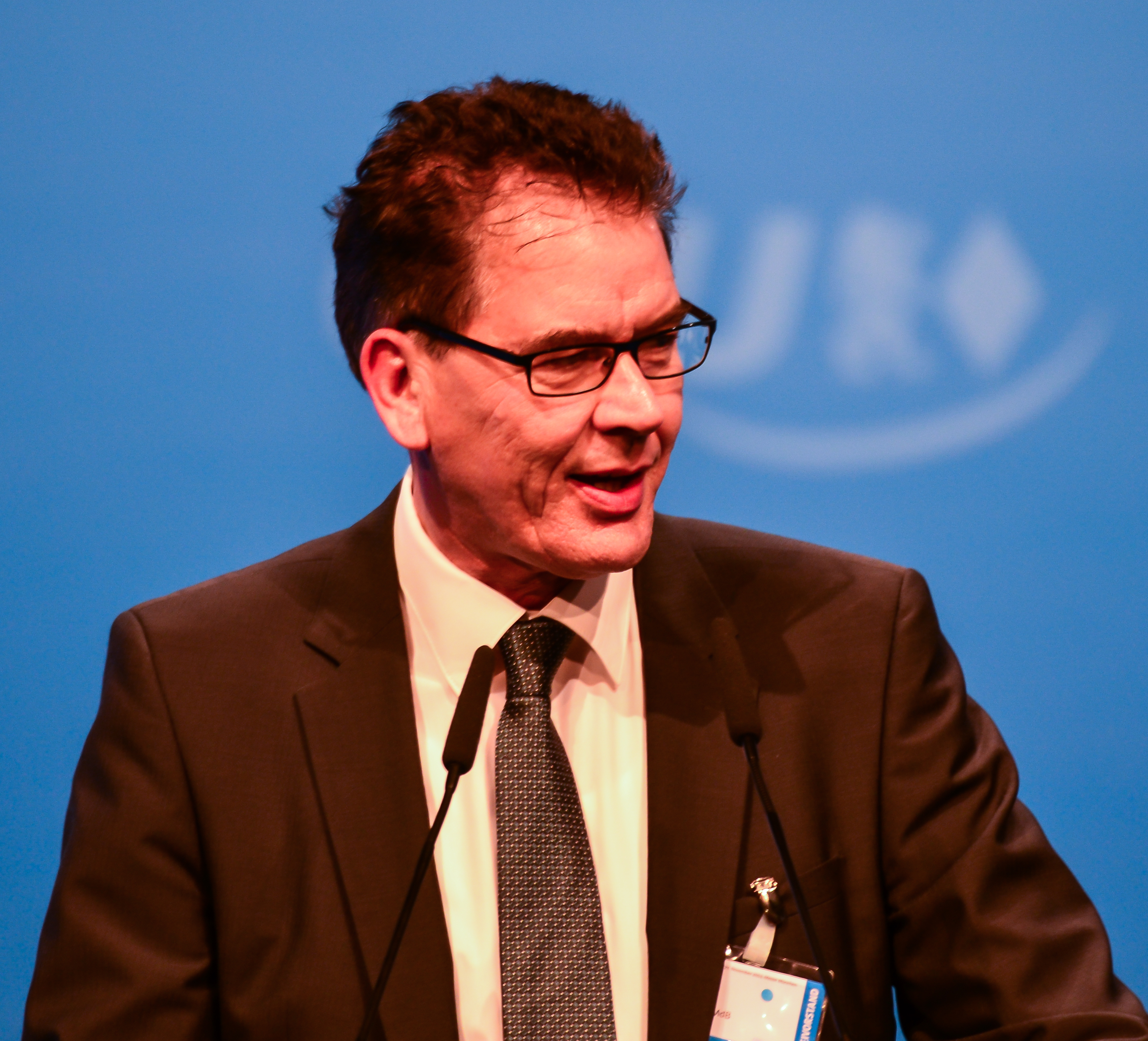 CSU Parteitag 2013 am 23.11.2013 in München